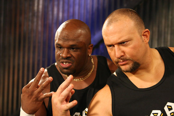 Pose característica de Team 3D.